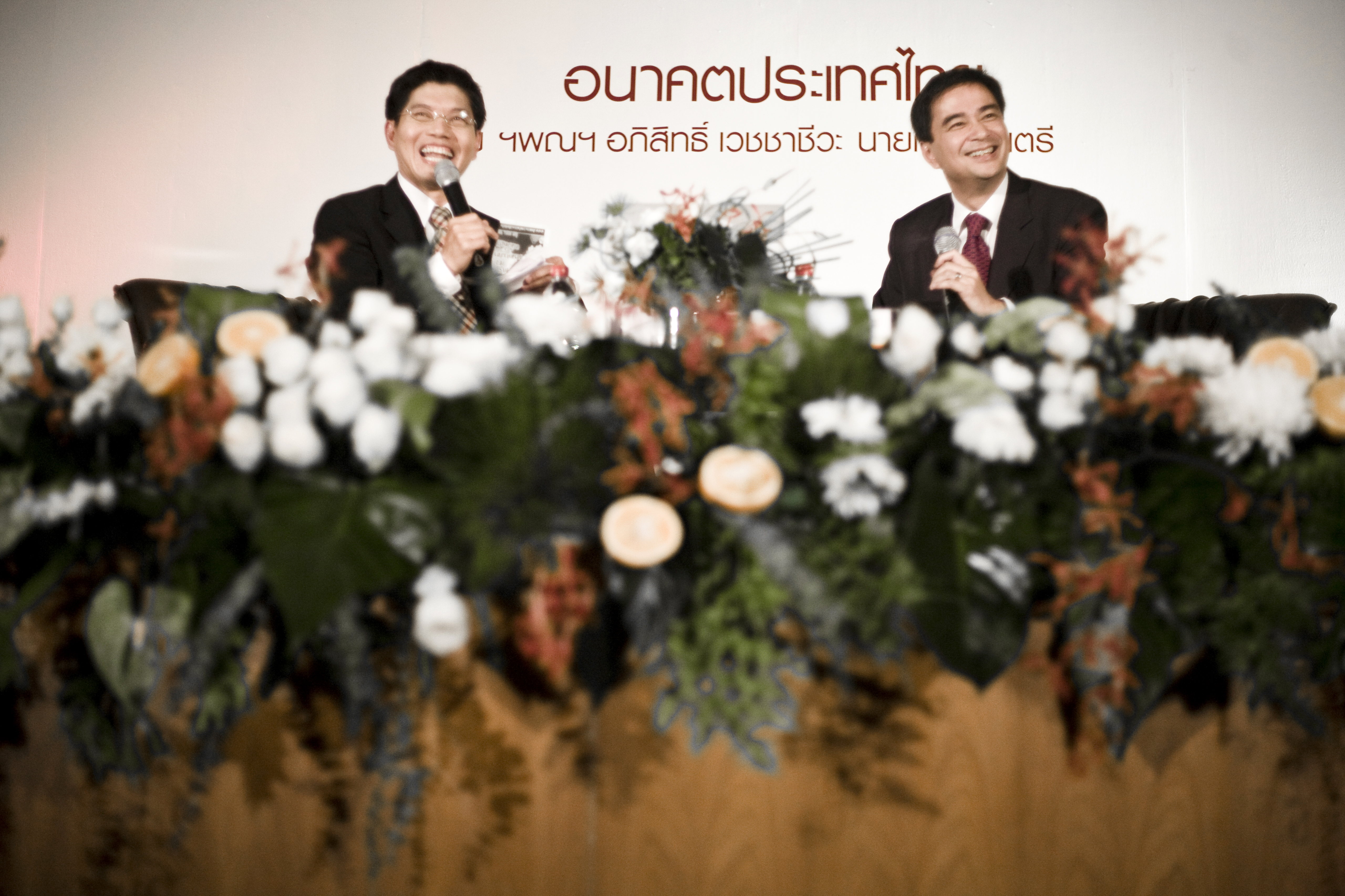 นายกรัฐมนตรี เป็นประธานพิธีเปิดงานธรรมศาสตร์วิชาการและแสดงปาฐกถาพิเศษเรื่อง "อนาคตประเทศไทย" ณ อาคารยิมเนเซียม 1 มหาวิทยาลัยธรรมศาสตร์ ศูนย์รังสิต อำเภอคลองหลวง จังหวัดปทุมธานี 20สิงหาคม2552 (The Official Site of The Prime Minister of Thailand Photo by พีรพัฒน์ วิมลรังครัตน์)